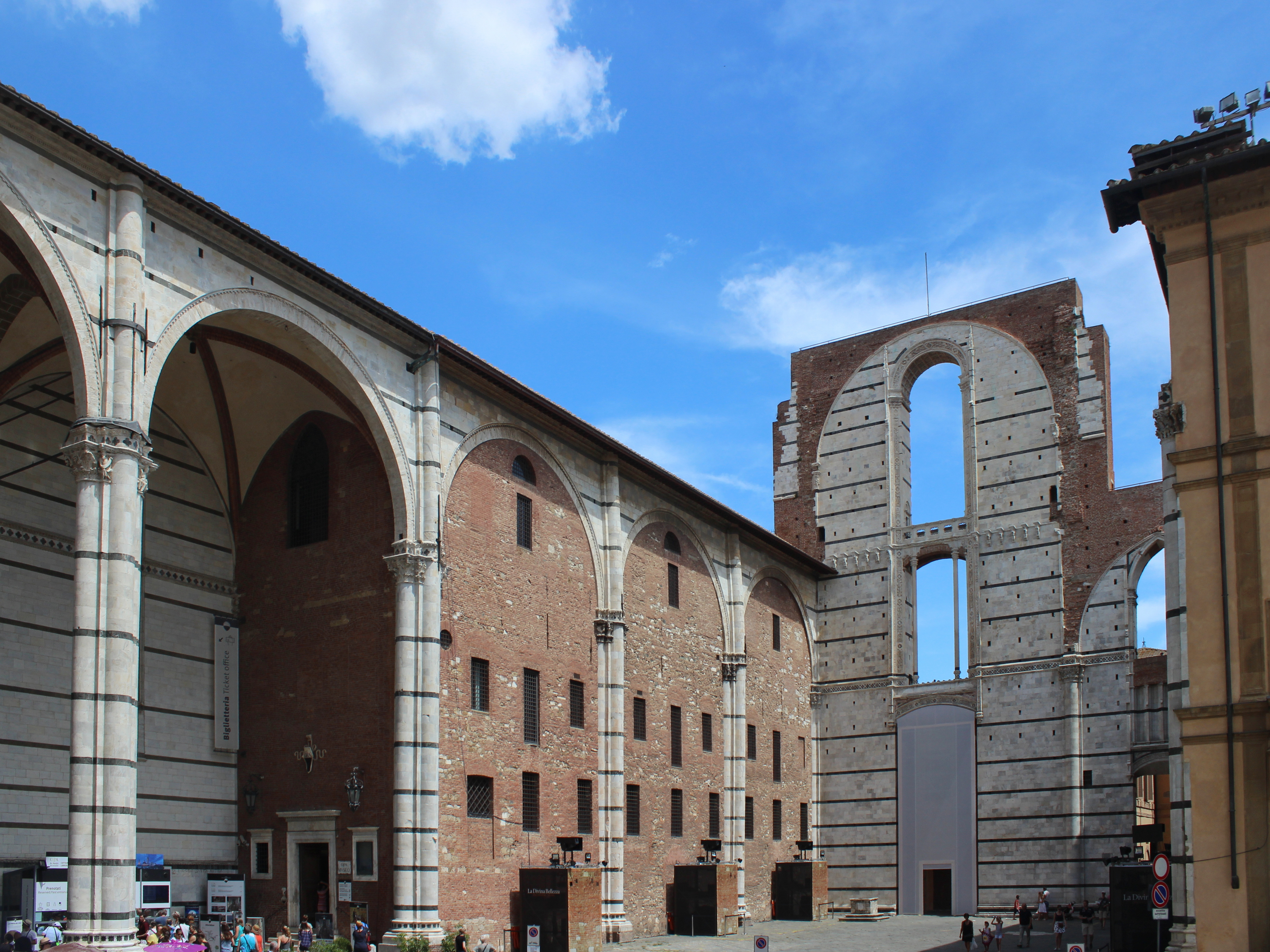 Catedral de Siena, nave sin terminar.